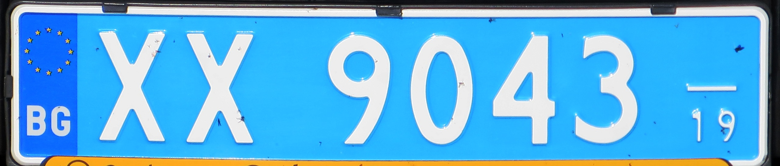 Import plaat Bulgarije